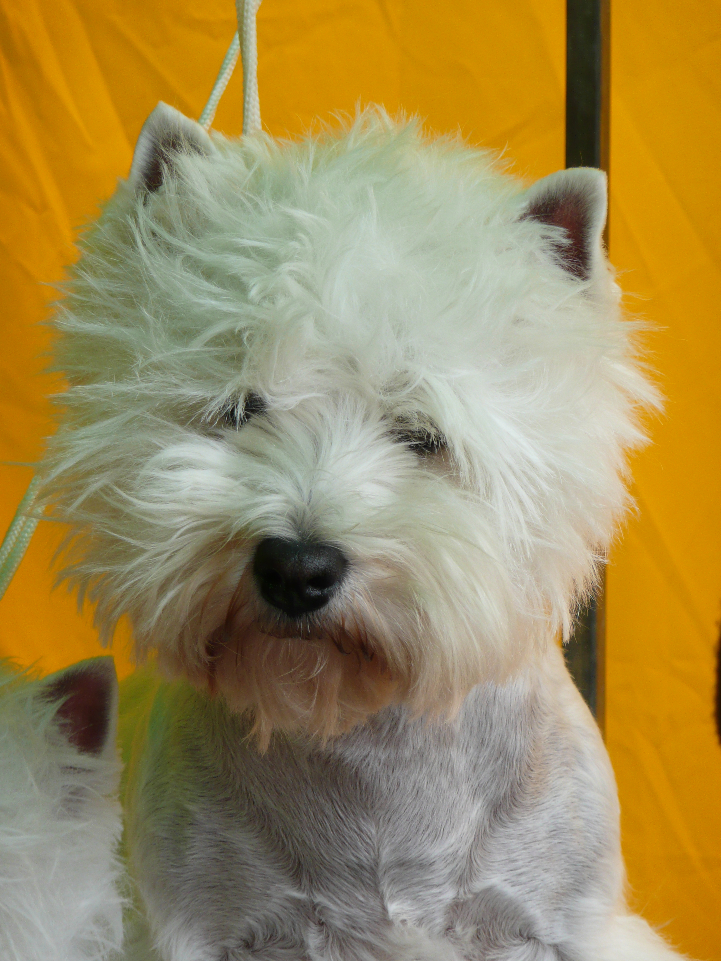 West Highland White Terrier